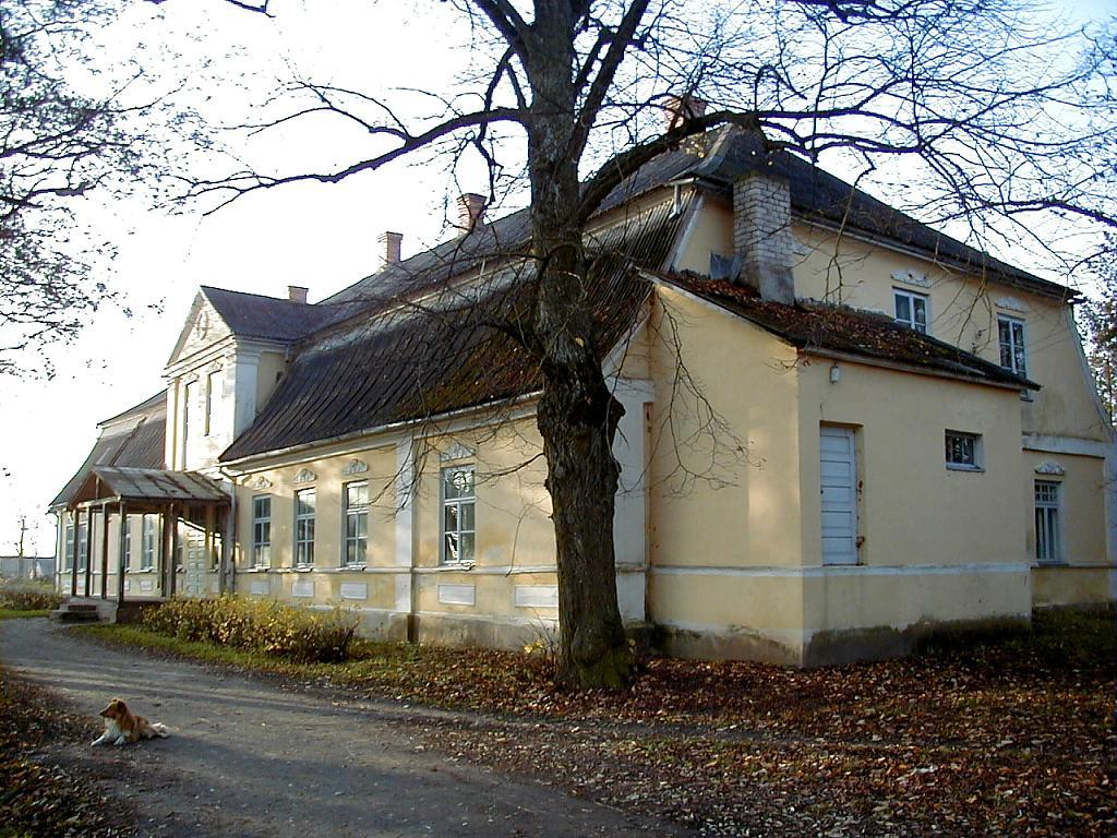 Codes muižas pils 2000-11-04